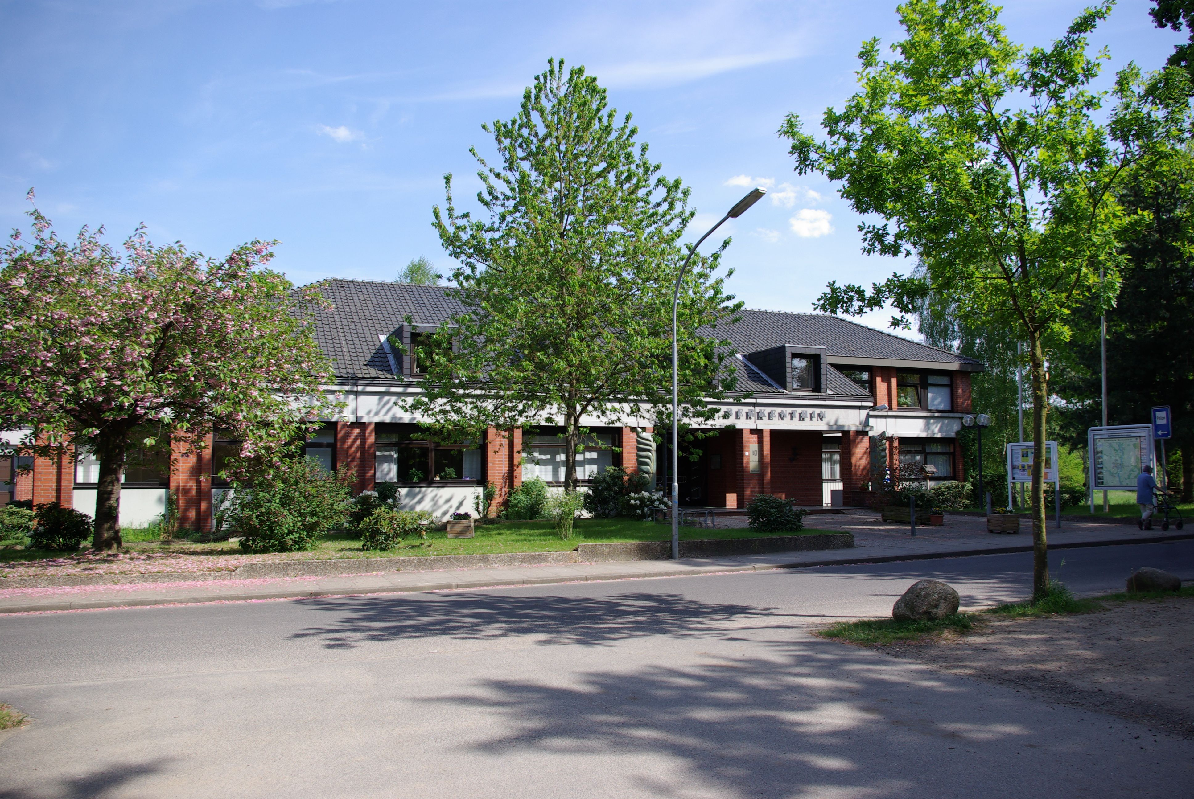 Berkenthin, Amt Berkenthin, die Verwaltung mit Standesamt (geotag in den exif-daten)